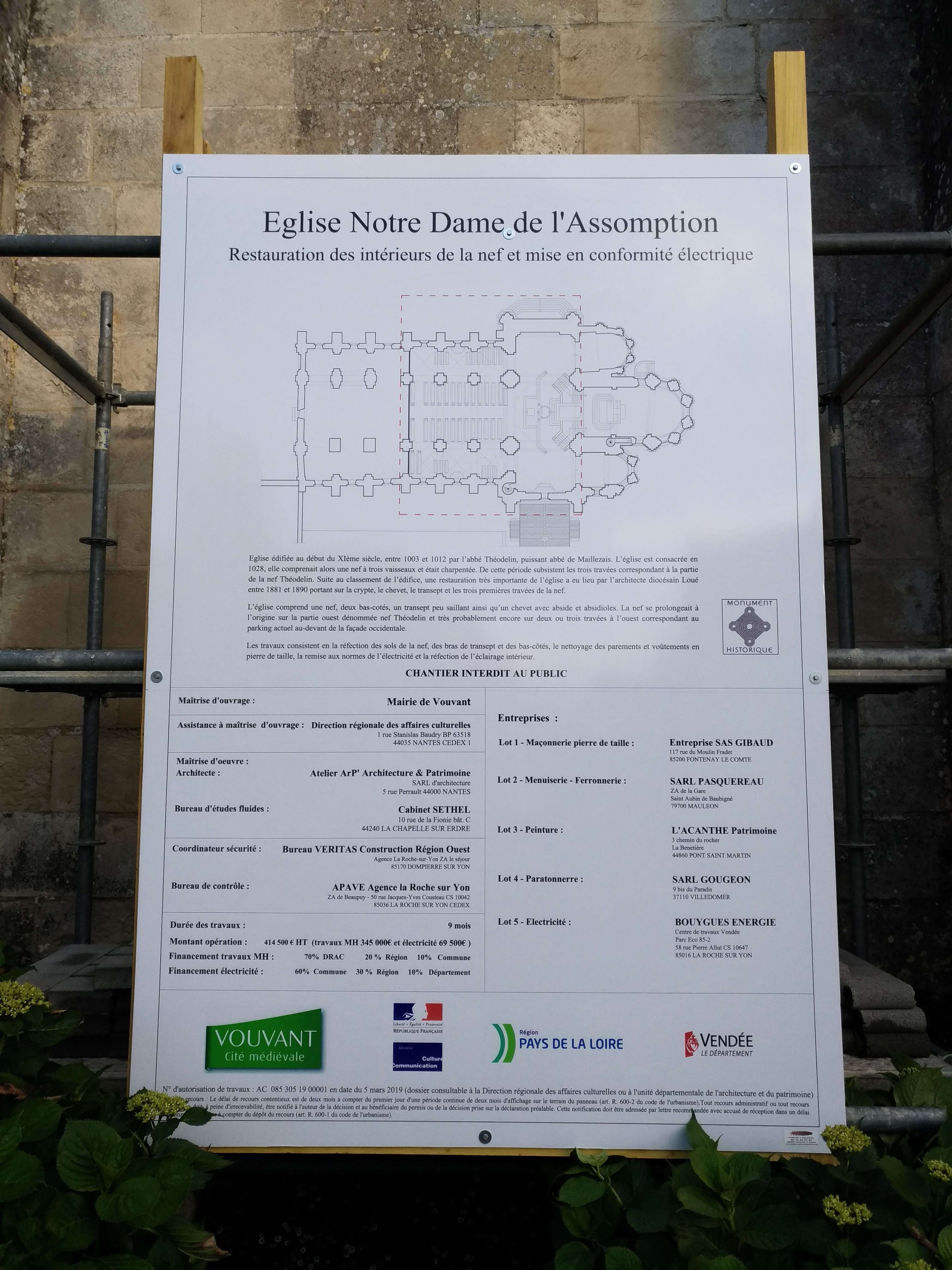 Panneau d'information annoncant les travaux réalisés dans l'église Notre-Dame de Vouvant. Première phase de travaux réalisée en 2019 : sol de la nef utilisée pour le culte, nettoyage des murs intérieurs, réfection de l'électricité.